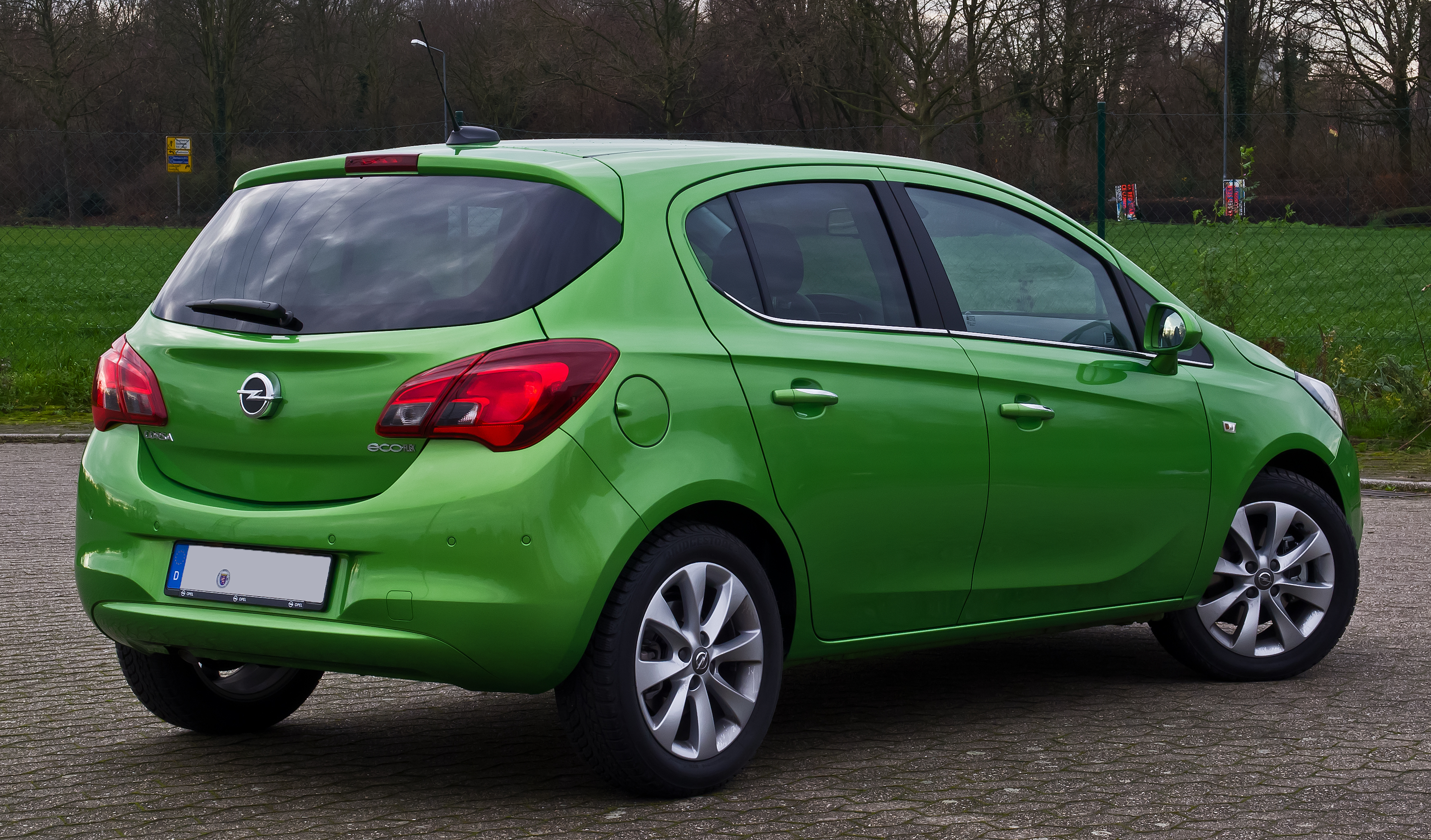 Opel Corsa 1.3 CDTI ecoFLEX Innovation (E)